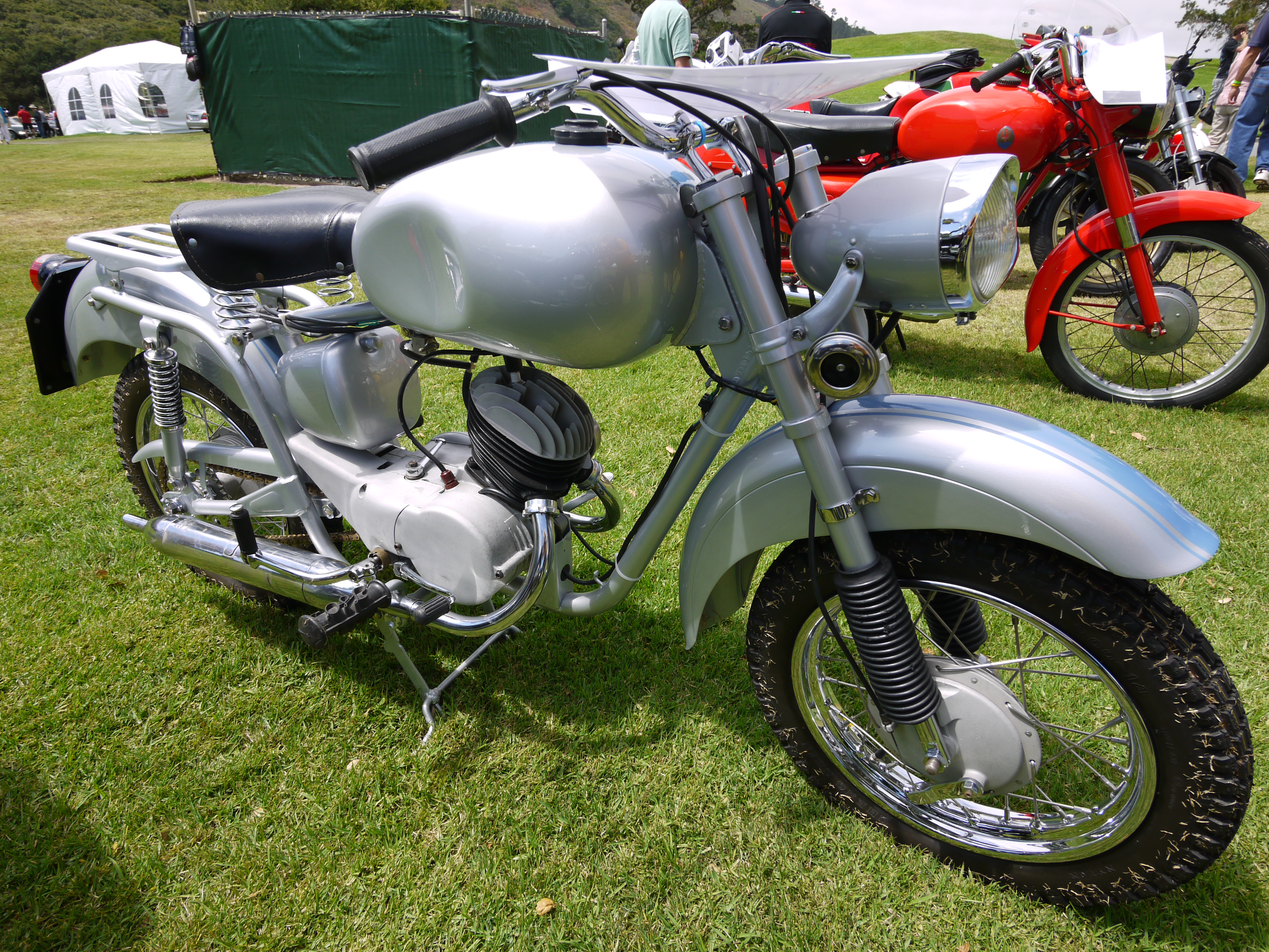 ISO 125